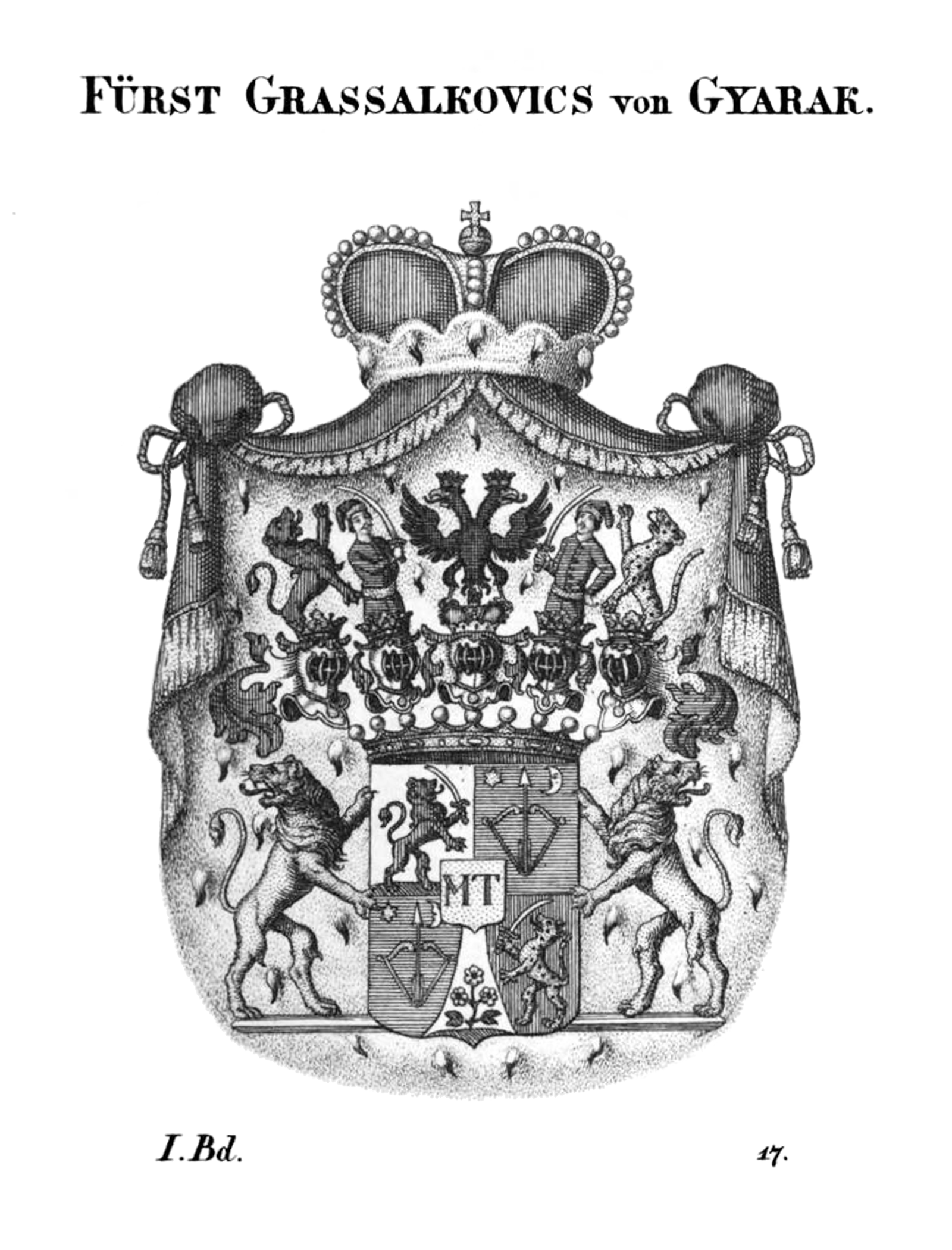 Wappen der Fürsten Grassalkovich de Gyaraki